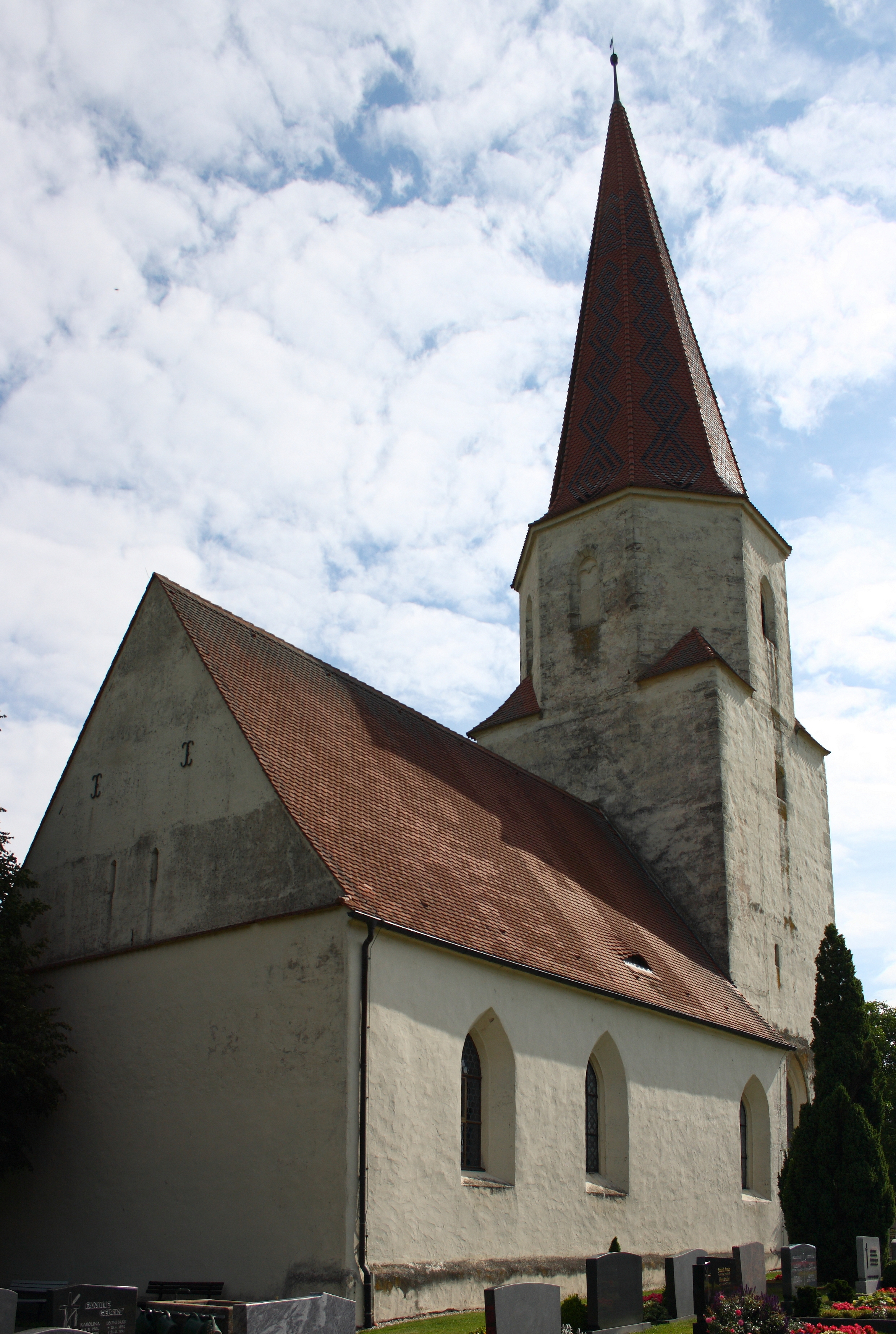 Evangelische Friedhofskirche, ehemals St. Martin, in Obermögersheim, einem Stadtteil von Wassertrüdingen im Landkreis Ansbach (Bayern), spätromanischer Chorturm mit Spitzhelm, Langhaus aus dem 15. Jahrhundert